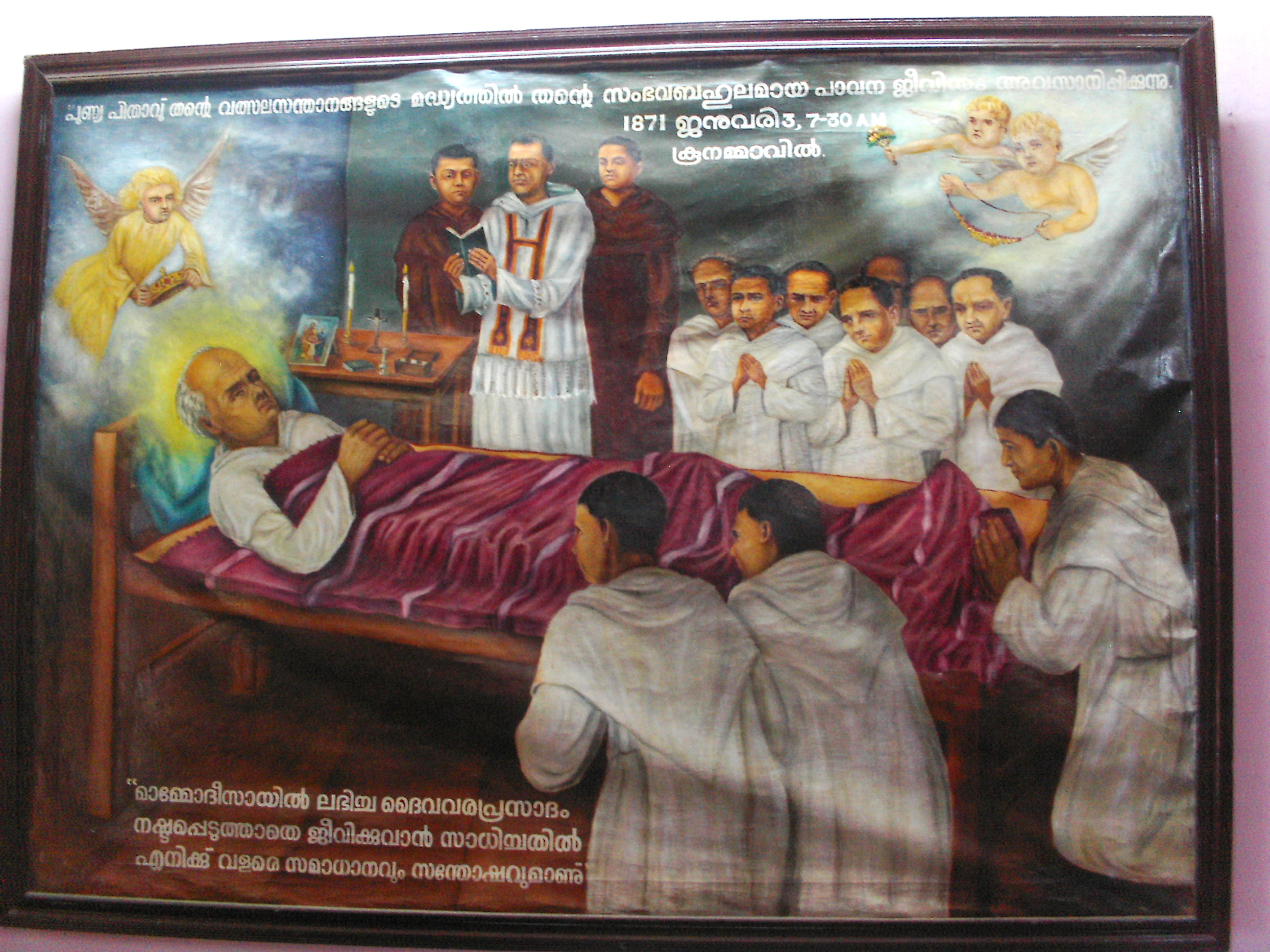 Tod des seligen Chavara, eigenes Foto aufgenommen in Mannanam, Indien, Gemälde von 1890